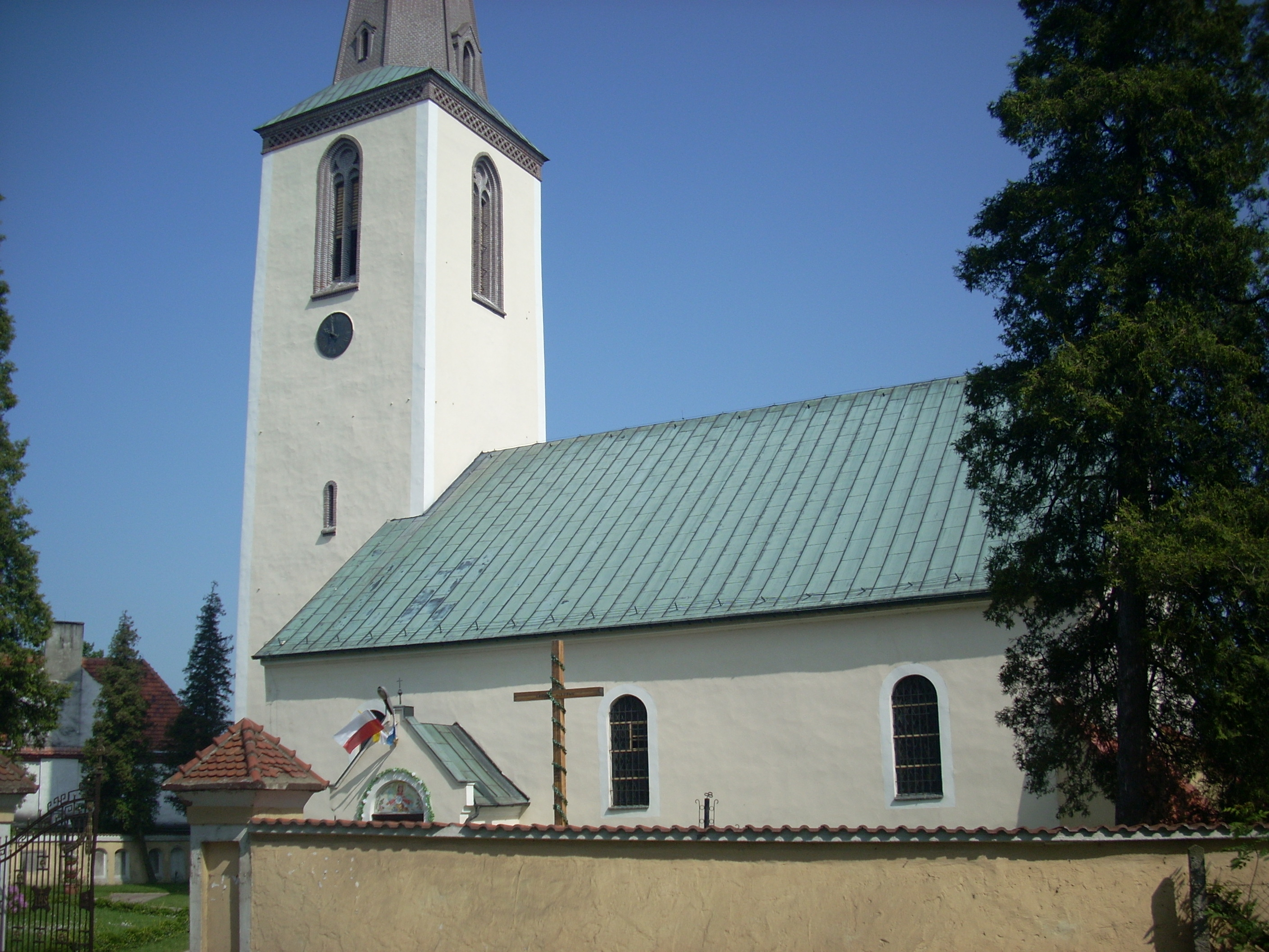 Jaźwina, Barokowy kościół pw. Wniebowstąpienia Pańskiego z 1692 r.